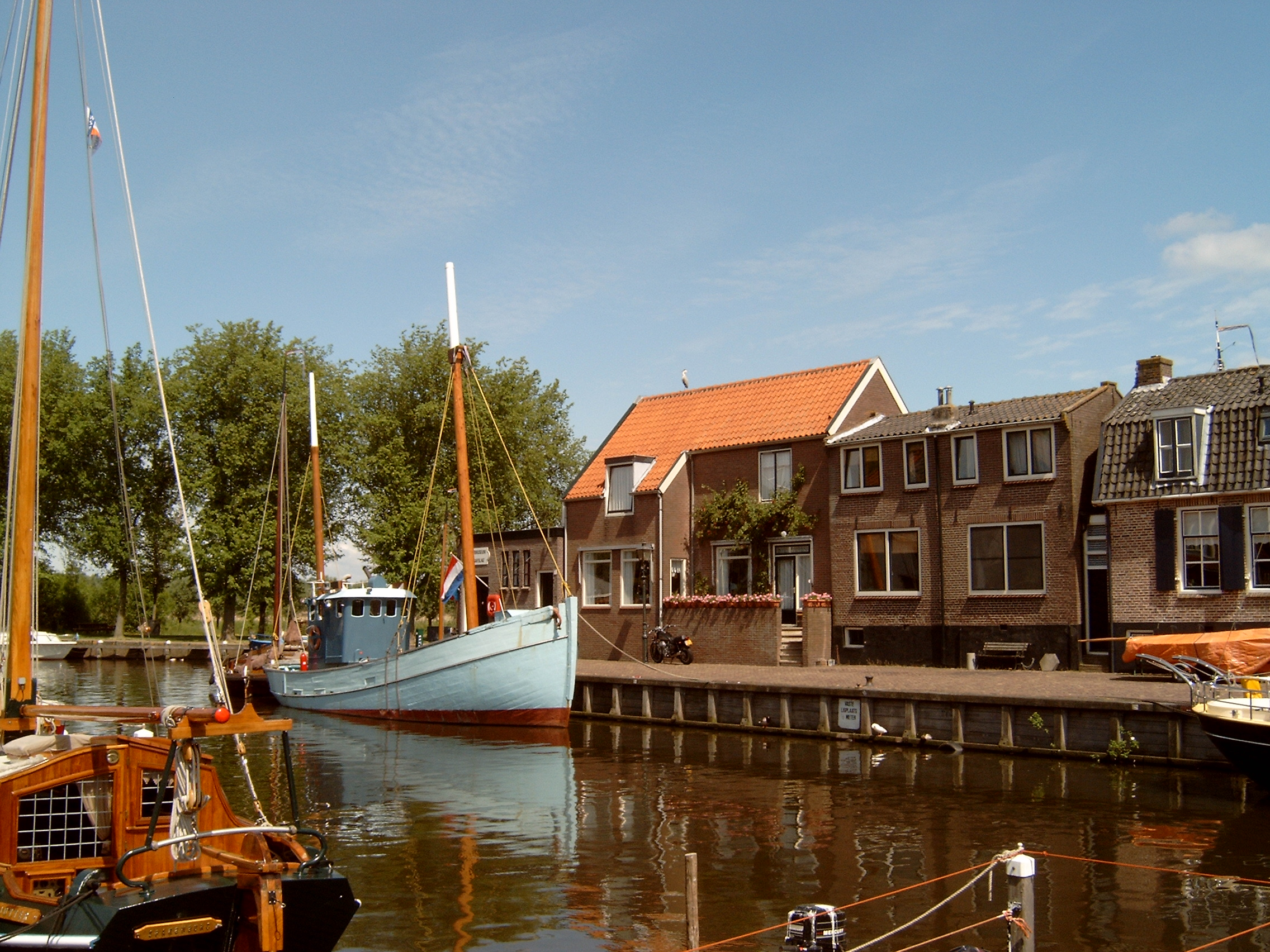 Spakenburg, zicht op de haven